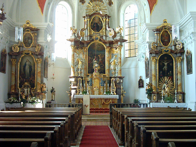 Die Innenausstattung der Alten Pfarrkirche in Schwarzenfeld (Oberpfalz)